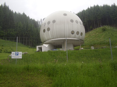 earthDATAsafe Hauptgebäude über der Erde